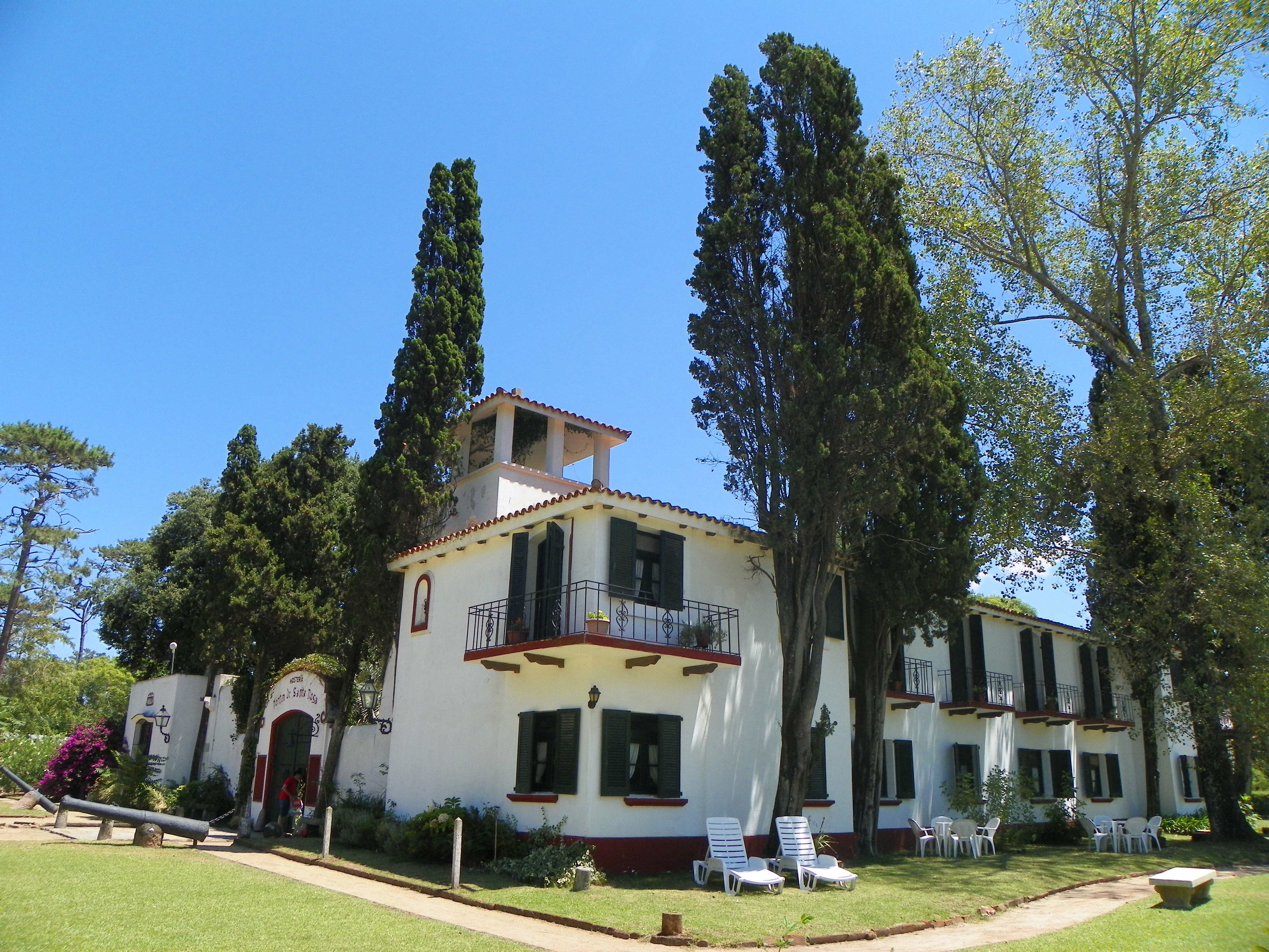 Fachada del Fortín de Santa Rosa, actualmente Hostería Fortín de Santa Rosa. Símbolo del balneario Fortín de Santa Rosa, Municipio de Salinas, Departamento de Canelones.